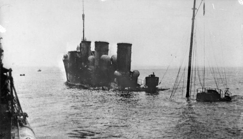 Pissen, Torpedoboot nach Minentreffer V 99 Großes Torpedoboot; Stapell: 9.2.1915; 17. Aug. 1915: Nach Minentreffer bei Pissen